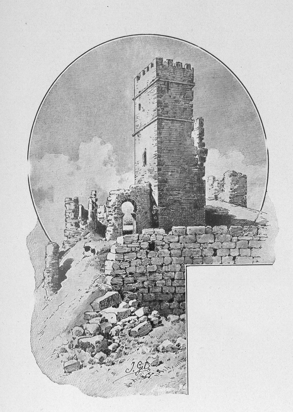 Detalle del castillo de Coruña del Conde.